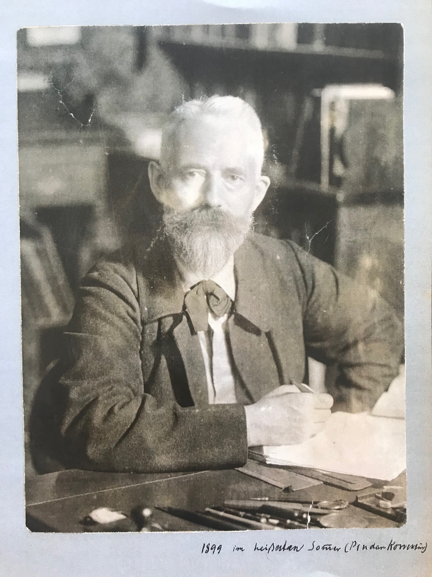 Portrait von Otto Schroder "1899 im heißesten Sommer (Pindar Korrektur)"